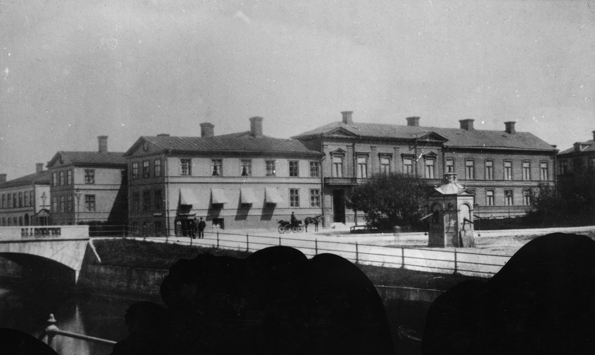 Gamla Gävle